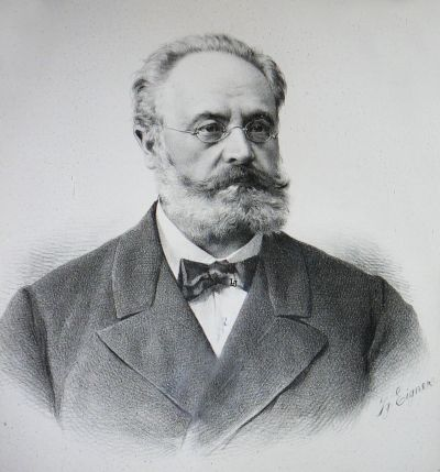 JUDr. Antonín Stöhr